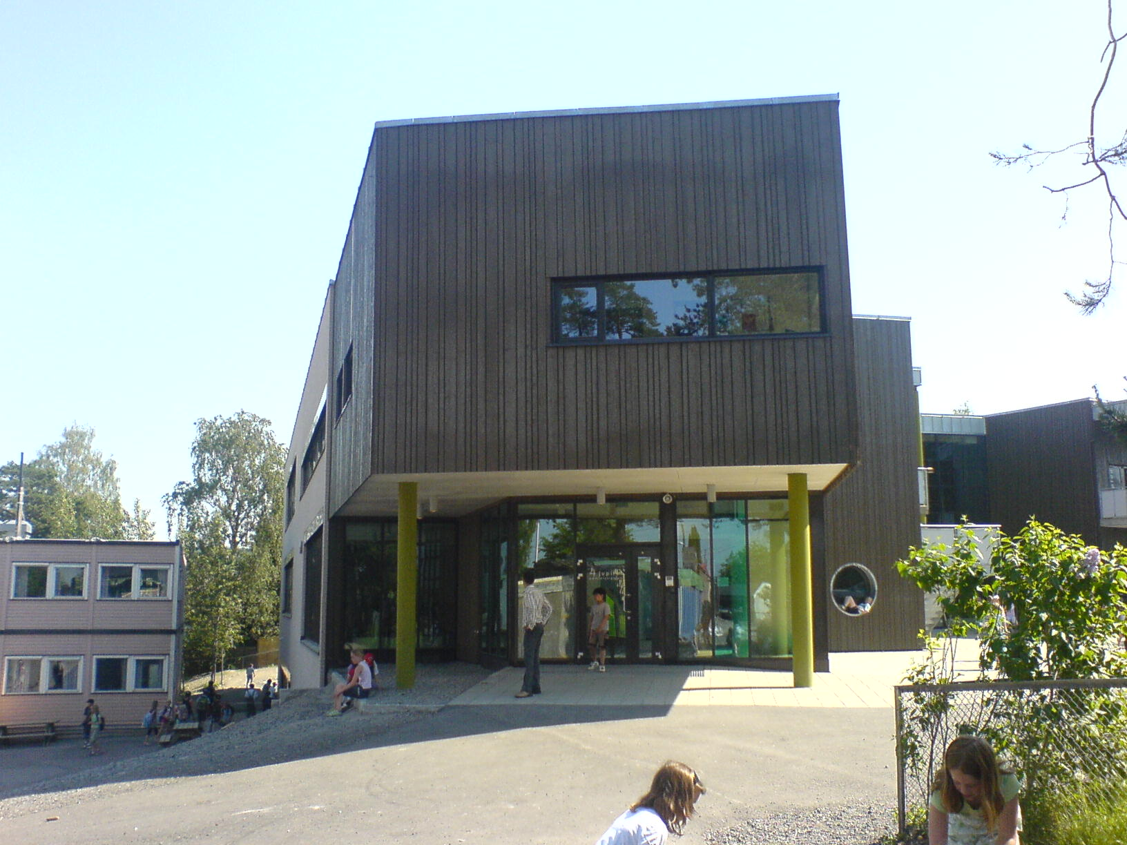 Høybråten skole i Oslo (Nybygget)